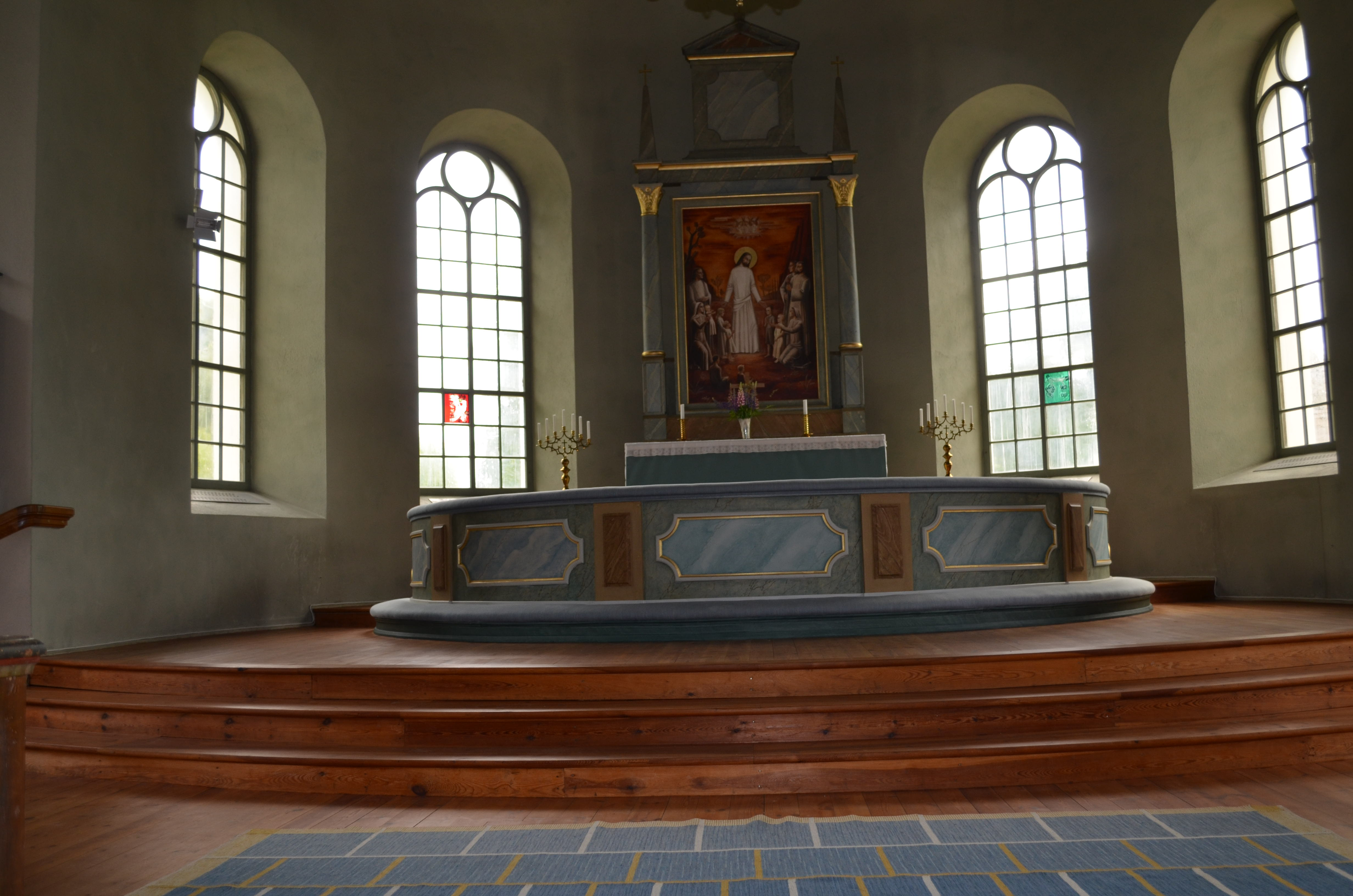 Altaret